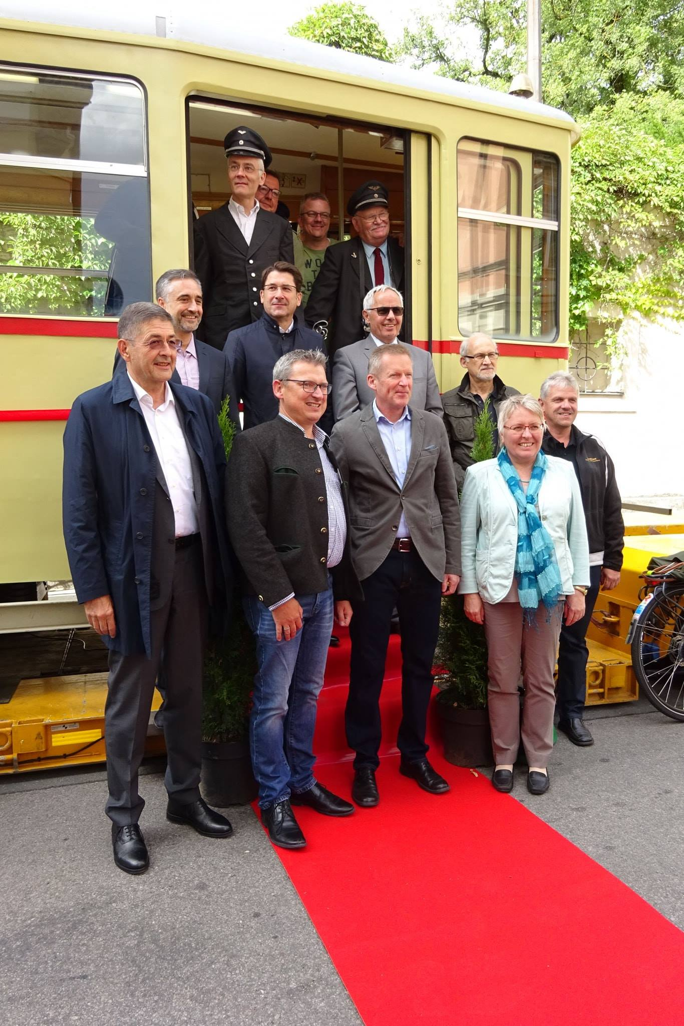 Restaurierter Beiwagen 79 beim Ostengassenfest 2018